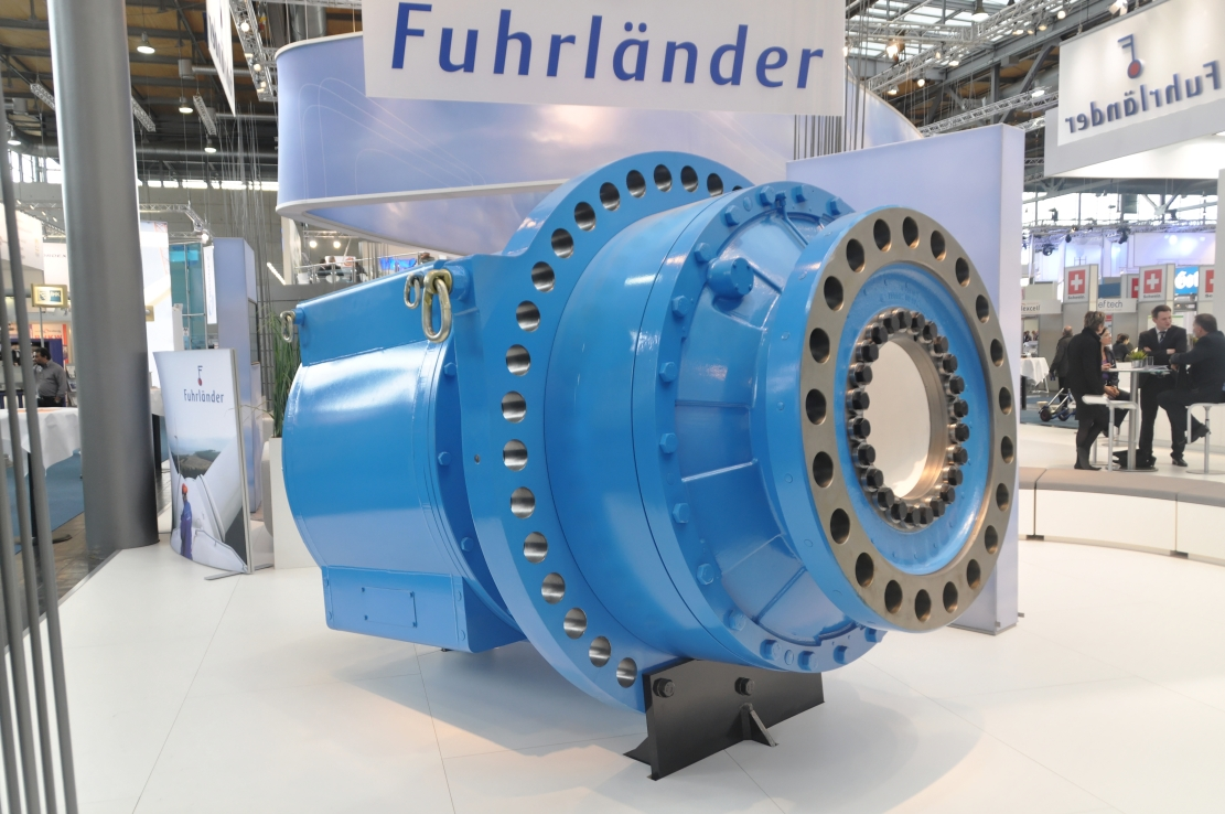 Hannover-Messe April 2012 Dieses Foto entstand durch die Mithilfe des gemeinnützigen Vereins Skillshare bei der Akkreditierung als Fotograf. Infos unter skillshare.eu Skillshare e.V. ist ein eingetragener gemeinnütziger Verein zur Förderung der Bildung durch Unterstützung der Erstellung, Sammlung und Verbreitung so genannten freien Wissens. IBAN: DE16 8306 5408 0004 8850 66 BIC: GENODEF1SLR Bank: VR-Bank Altenburger Land